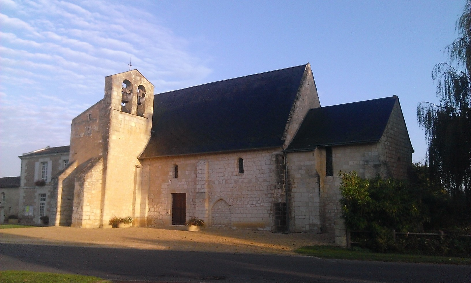 Église de Morton (Vienne)